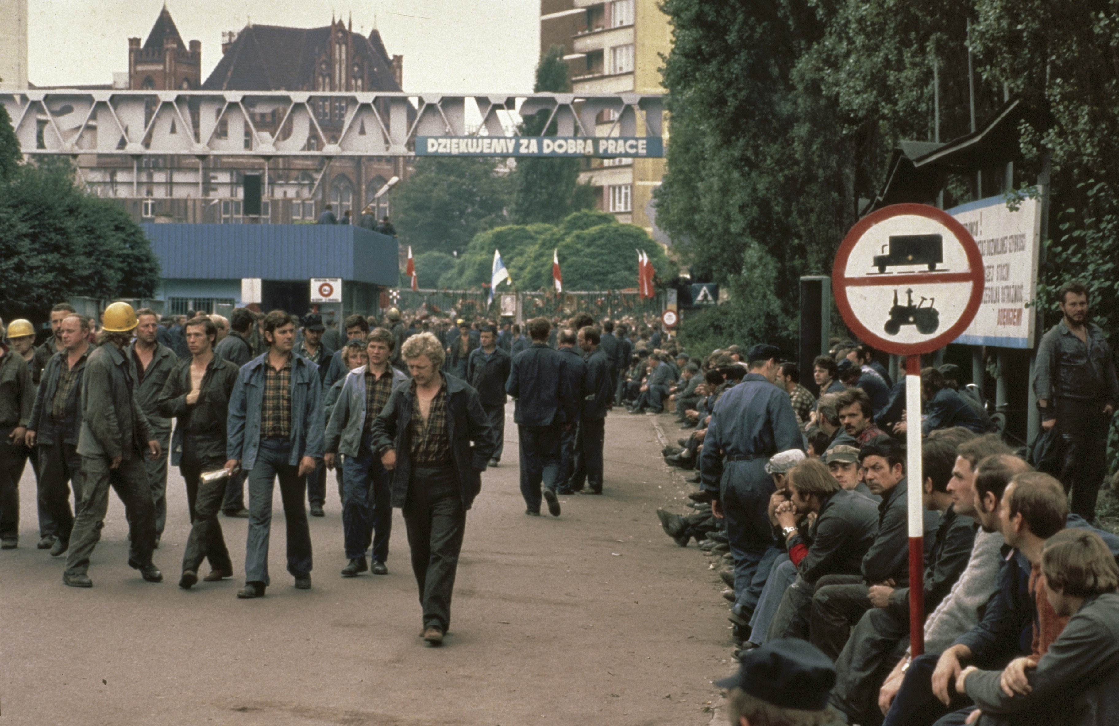 Collectie / Archief : Fotocollectie Anefo Reportage / Serie : Stakingen in Polen 1980: Leninwerf Gdansk Beschrijving : Wachtende stakers van de Leninwerf Datum : 20 augustus 1980 Locatie : Gdansk, Polen Trefwoorden : arbeiders, scheepsbouw, stakingen, wachten Fotograaf : [onbekend] Auteursrechthebbende : Nationaal Archief Materiaalsoort : Dia (kleur) Nummer archiefinventaris : bekijk toegang 2.24.01.06 Bestanddeelnummer : 253-8309